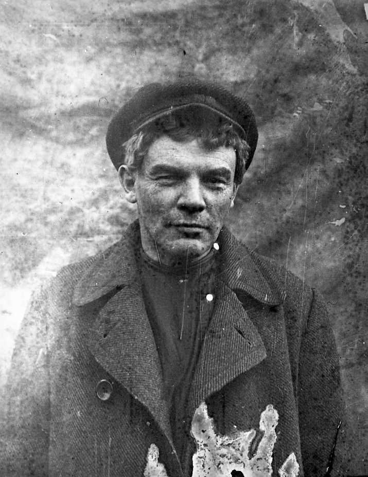 Lenin disfrazado en la fotografía de su pasaporte falso para huir a Finlandia en el verano de 1917, tomada en la estación de Razliv.